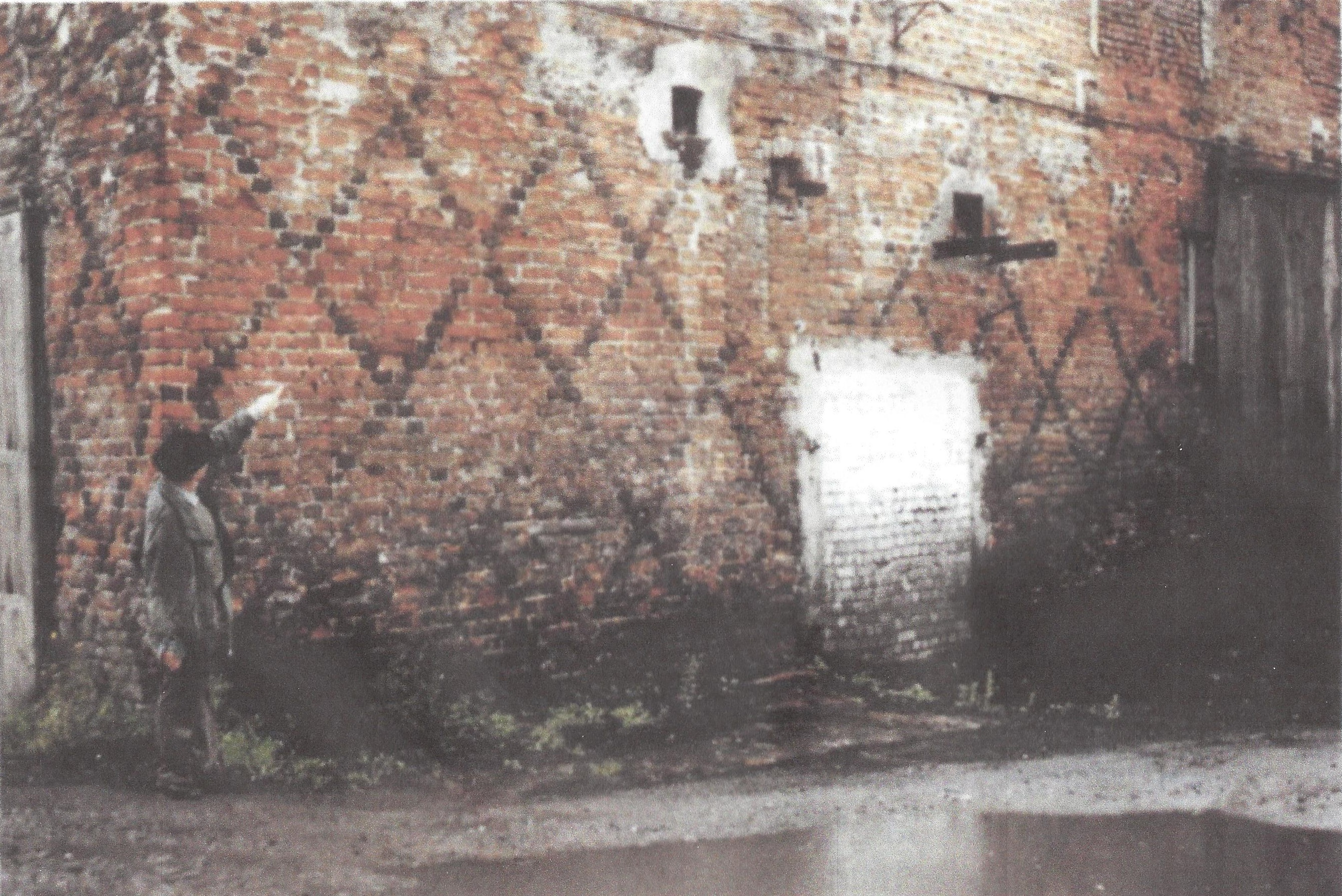 Fotografie der Außenmauern der Ruine der früheren Ordensburg Tilsit